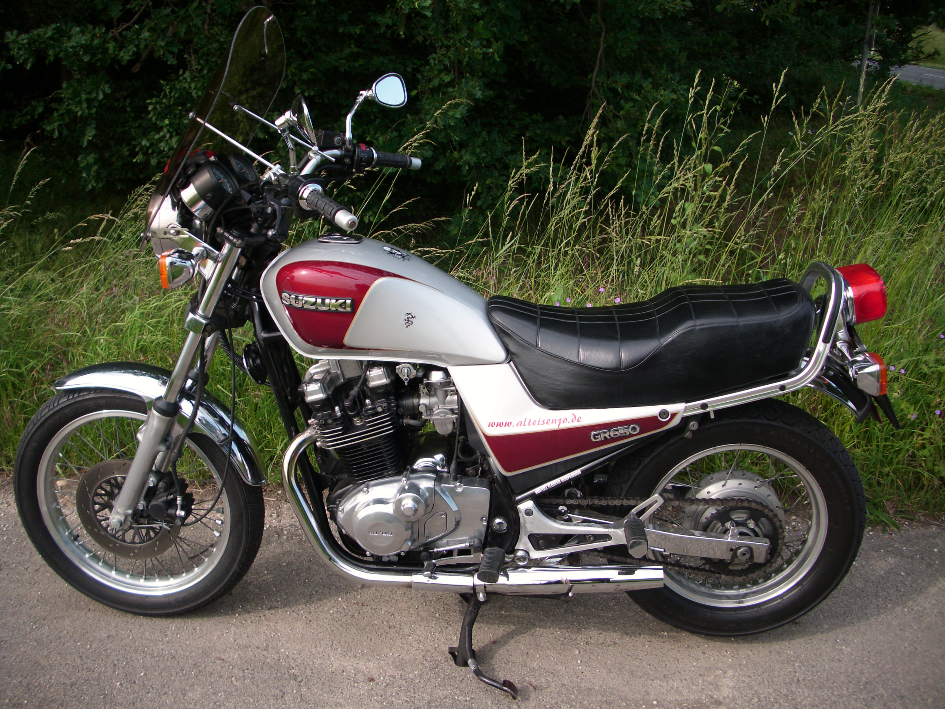 Suzuki GR 650 Tempter von der linken Seite